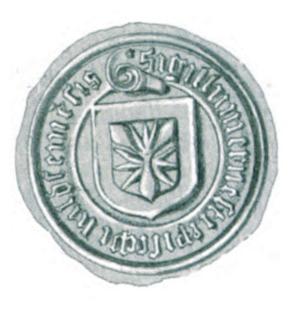 Siegel des Ernst I. von Schauenburg († 22/23. Juli 1471) ab 1458 Bischof von Hildesheim. Er war der dritte Sohn von Otto II. und dessen Frau Elisabeth von Hohenstein. Das Siegel stammt aus der Zeit um 1465.